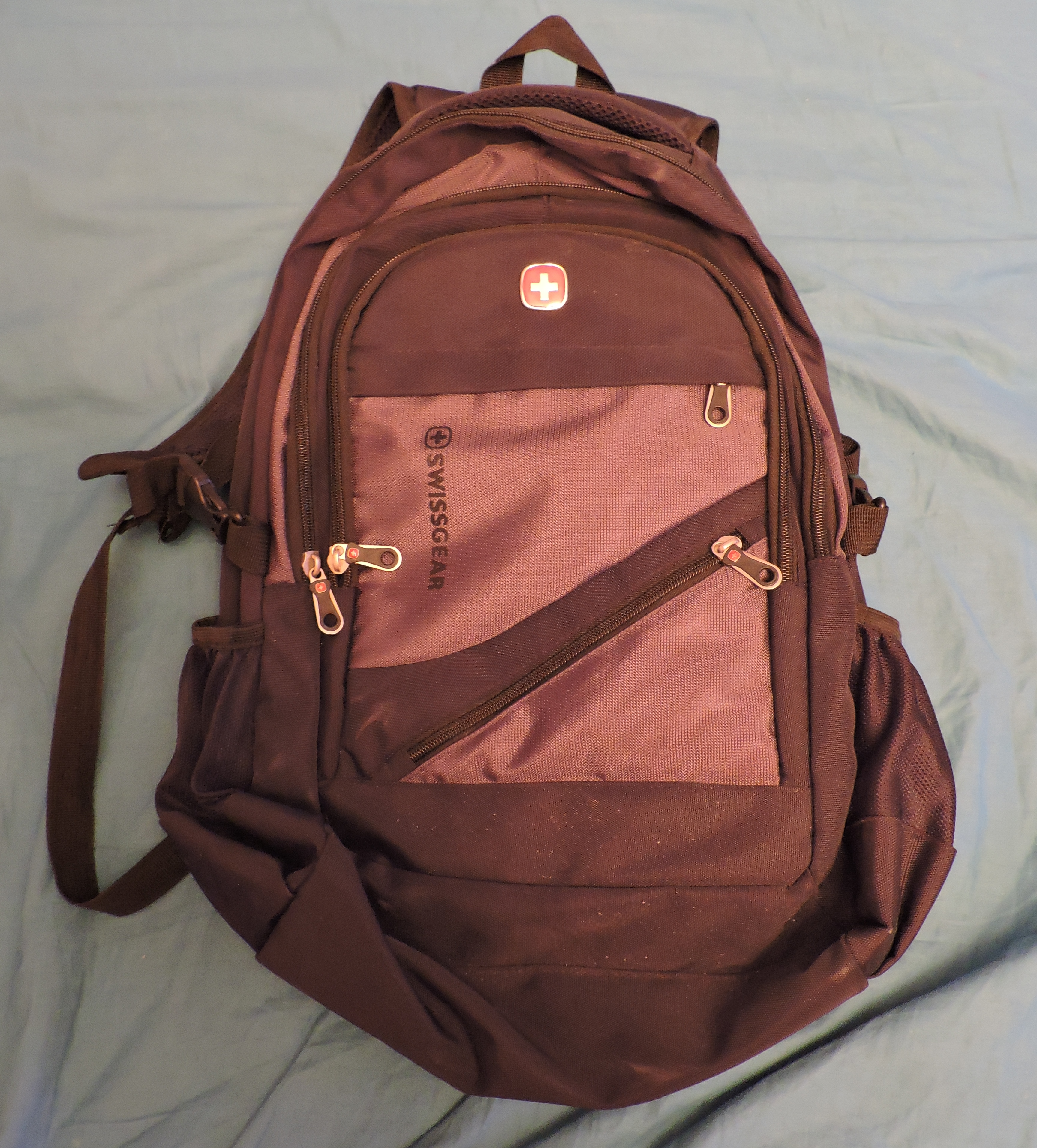 Рюкзаки известной швейцарской марки Swissgear весьма часто подделывают!!!